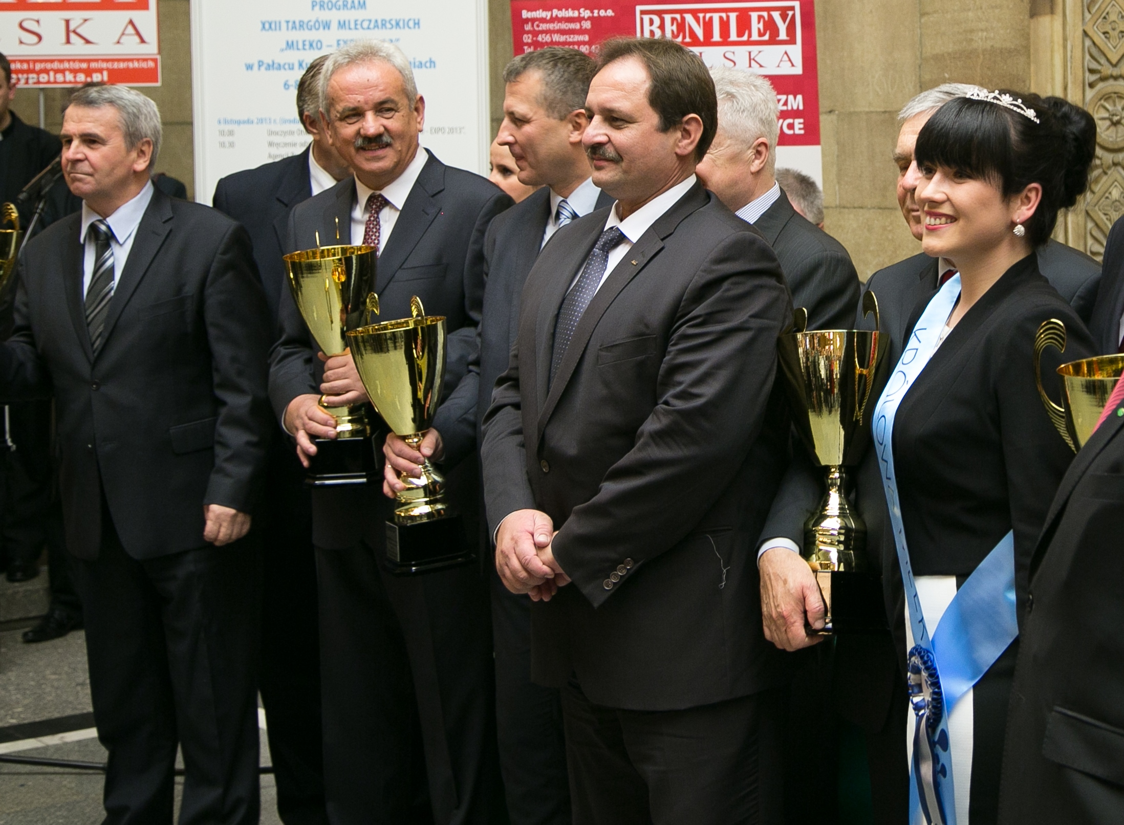 Mleko Expo 2013: Dariusz Sapiński (Mlekovita),Szczepan Szumowski (OSM Giżycko), Radosław Szatkowski (ARR), Katarzyna Gajownik (Królowa Mleka), Warschauer Kulturpalast, 6.11.2013